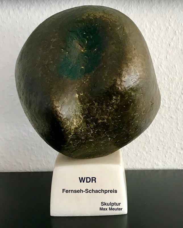 Diese Skulptur von Max Meuter war bis 2002 der Siegerpokal für die Sendung Schach der Großmeister des WDR.